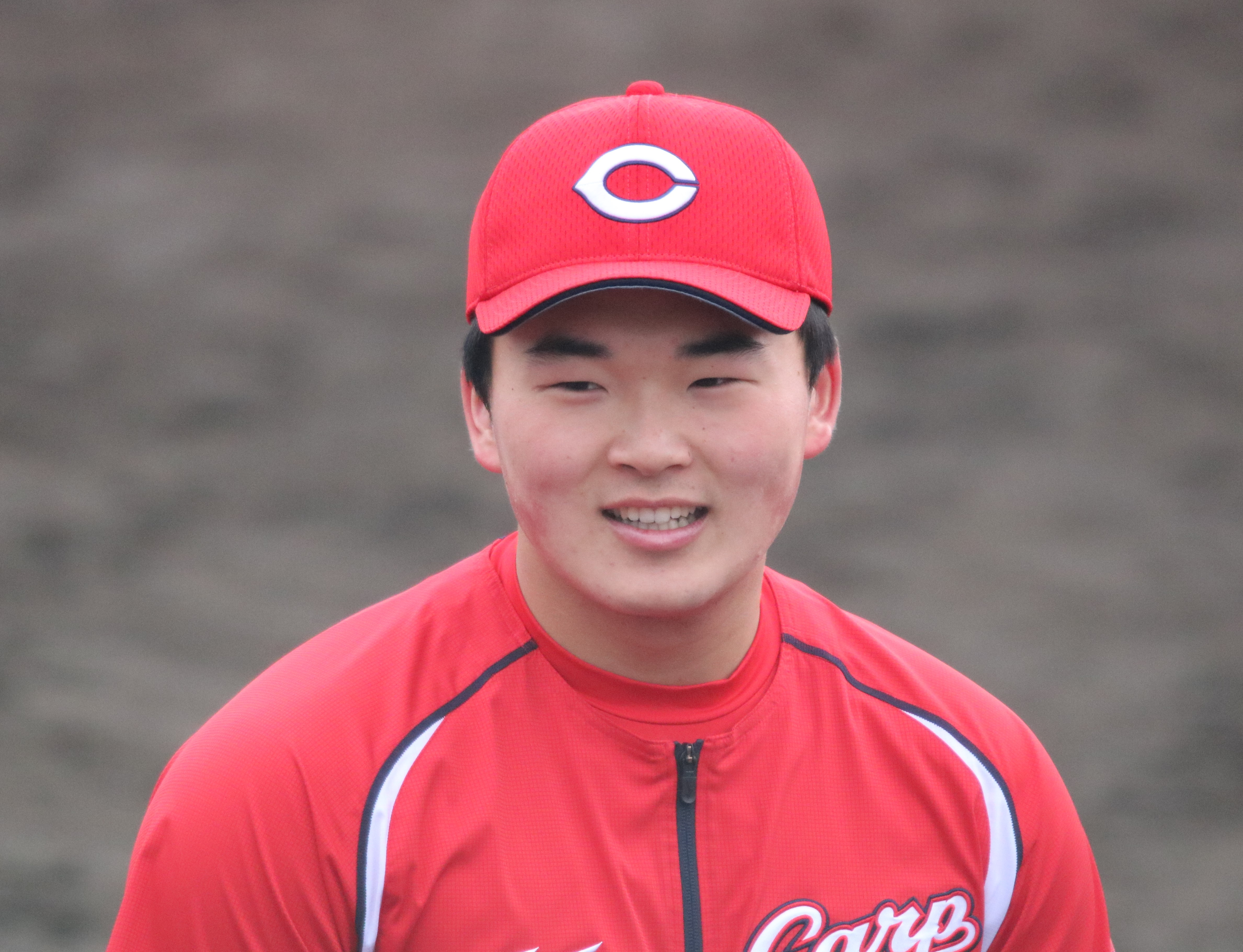 2018/2/8 春季キャンプ(東光寺球場)